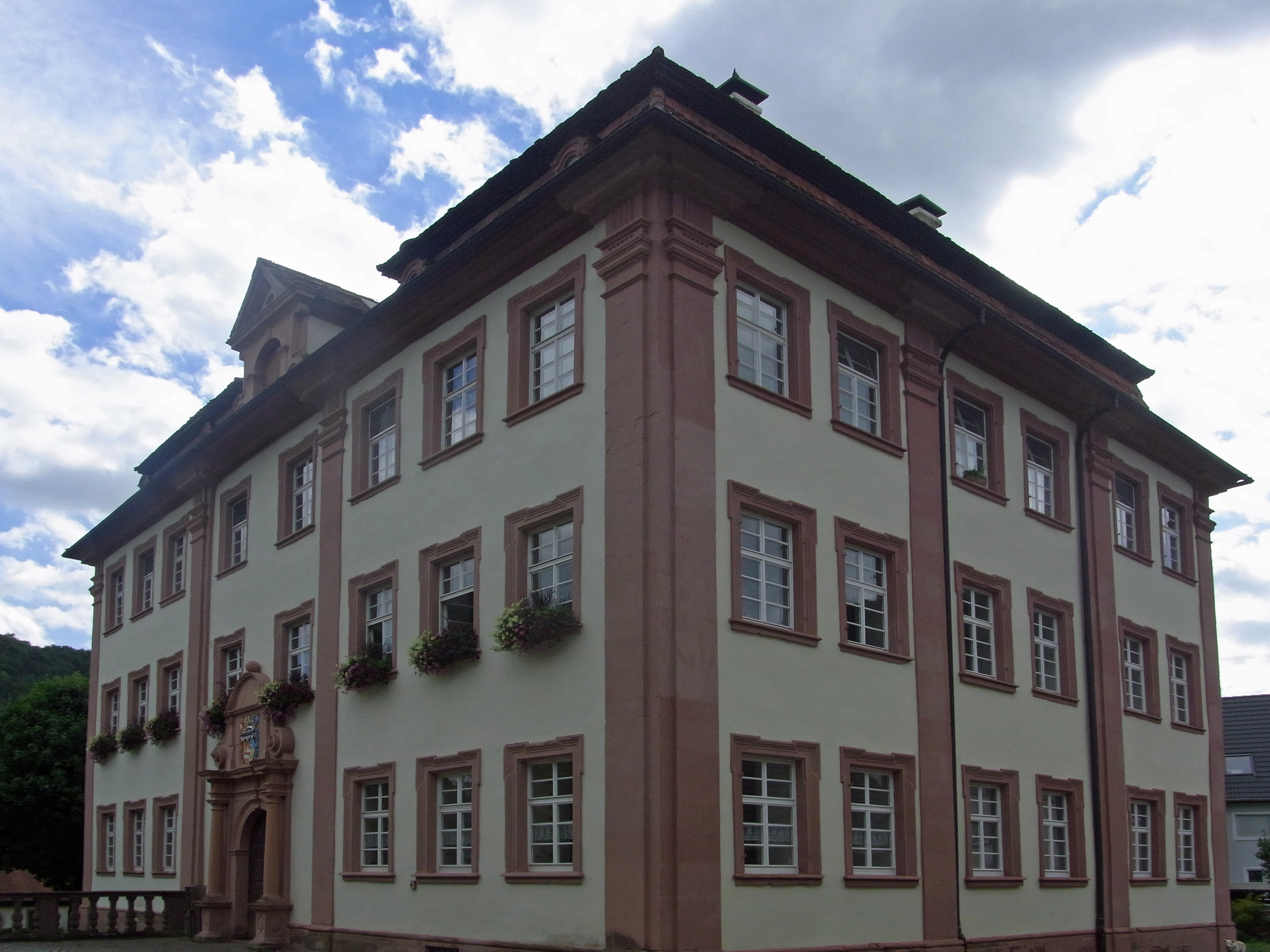 Horb-Dettingen: Schloss des Kloster Muri